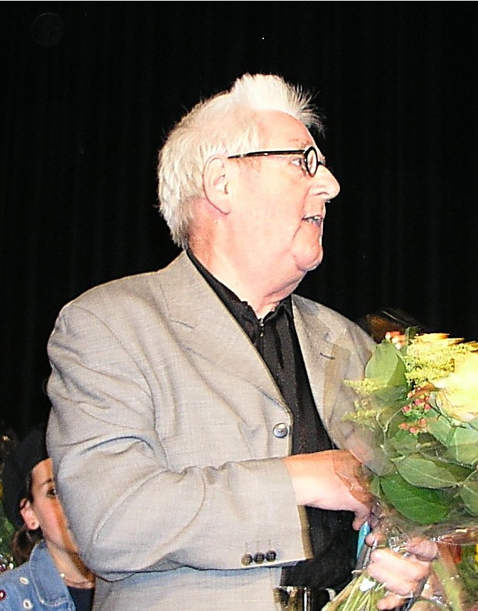 Nederlands kinderboekenschrijver Dolf Verroen na afloop van een schoolmusical naar zijn boek De Verschrikkelijke Schoolmeester